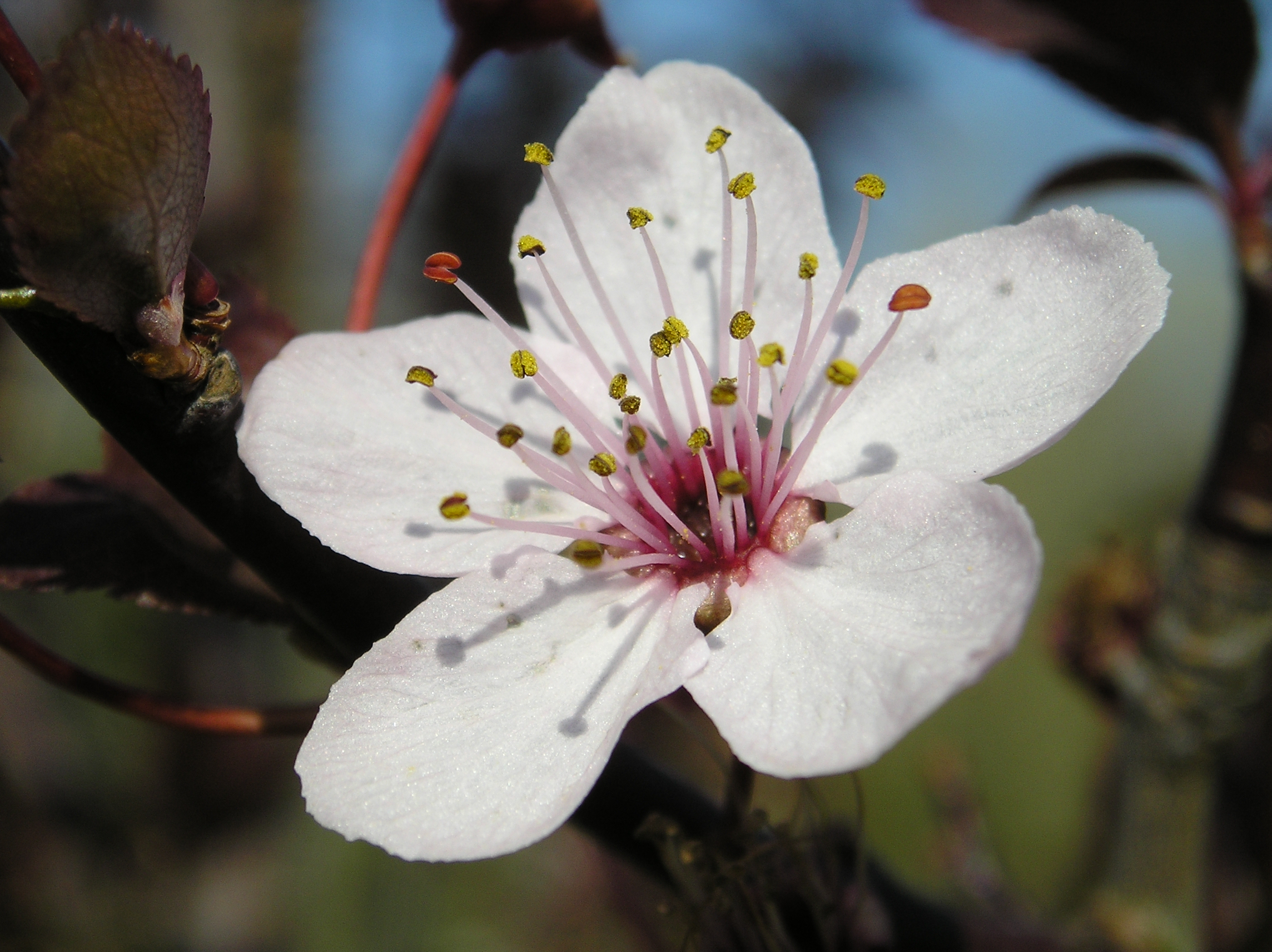 Fleur de prunus cerasifera